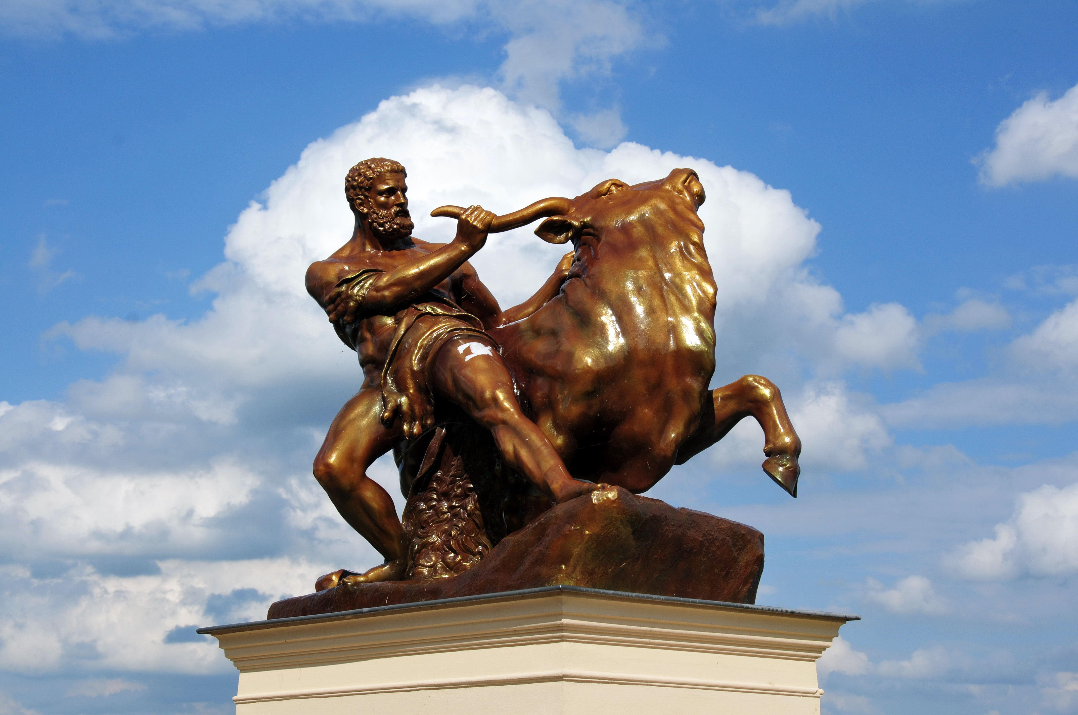 Schwerin; mit 50mm Brennweite von der Orangerie zum Bahnhof 15:39 Uhr: Am Rand der Orangerie steht die Statue des Herakles, vom Wandelgang aus prima mit 50 mm formatfüllend zu fotografieren